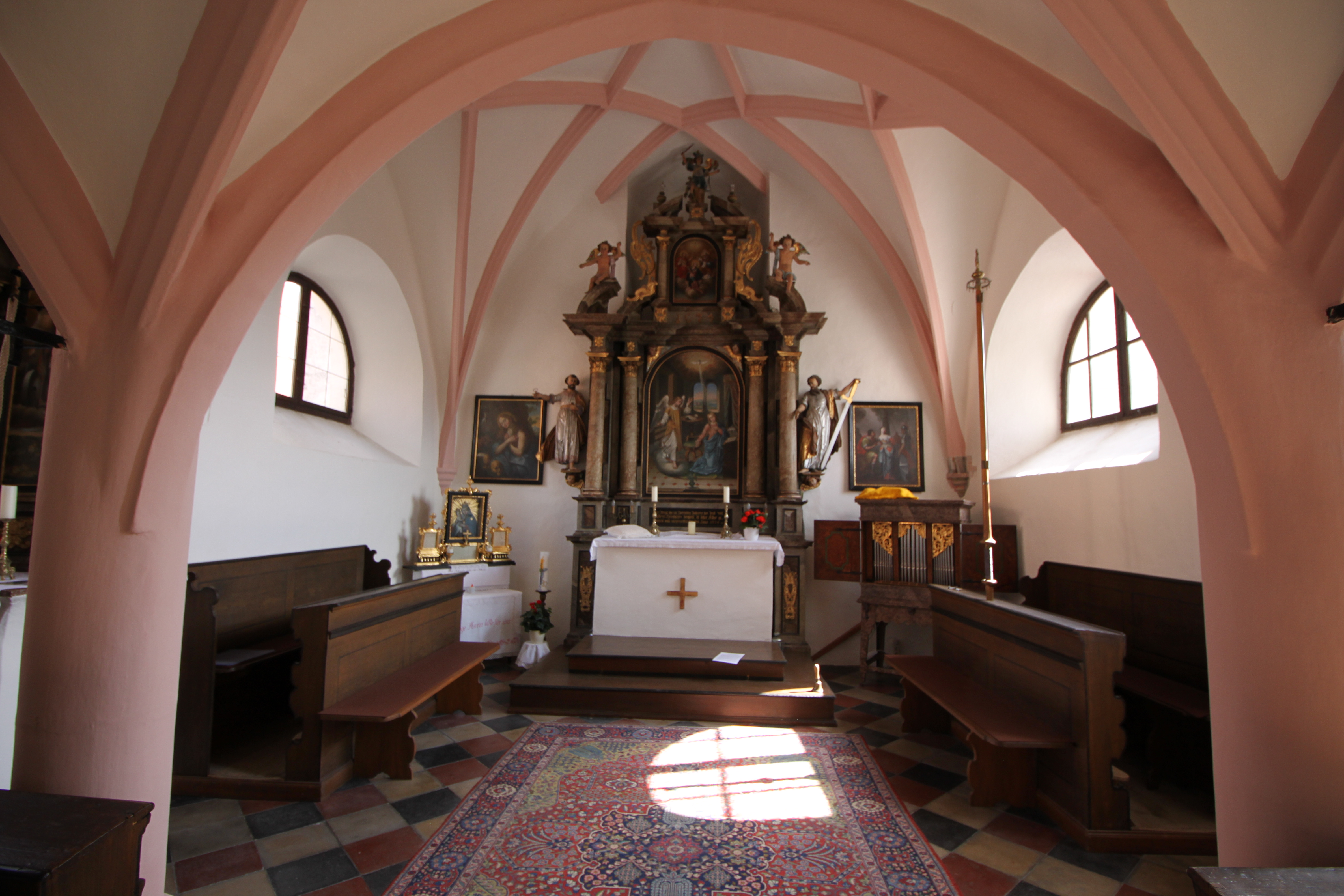 Kapelle hl. Maria Magdalena, Marktkapelle Emmersdorf, unter der Empore in den Kapellenraum zum Hochaltar, rechts davon die Tragorgel